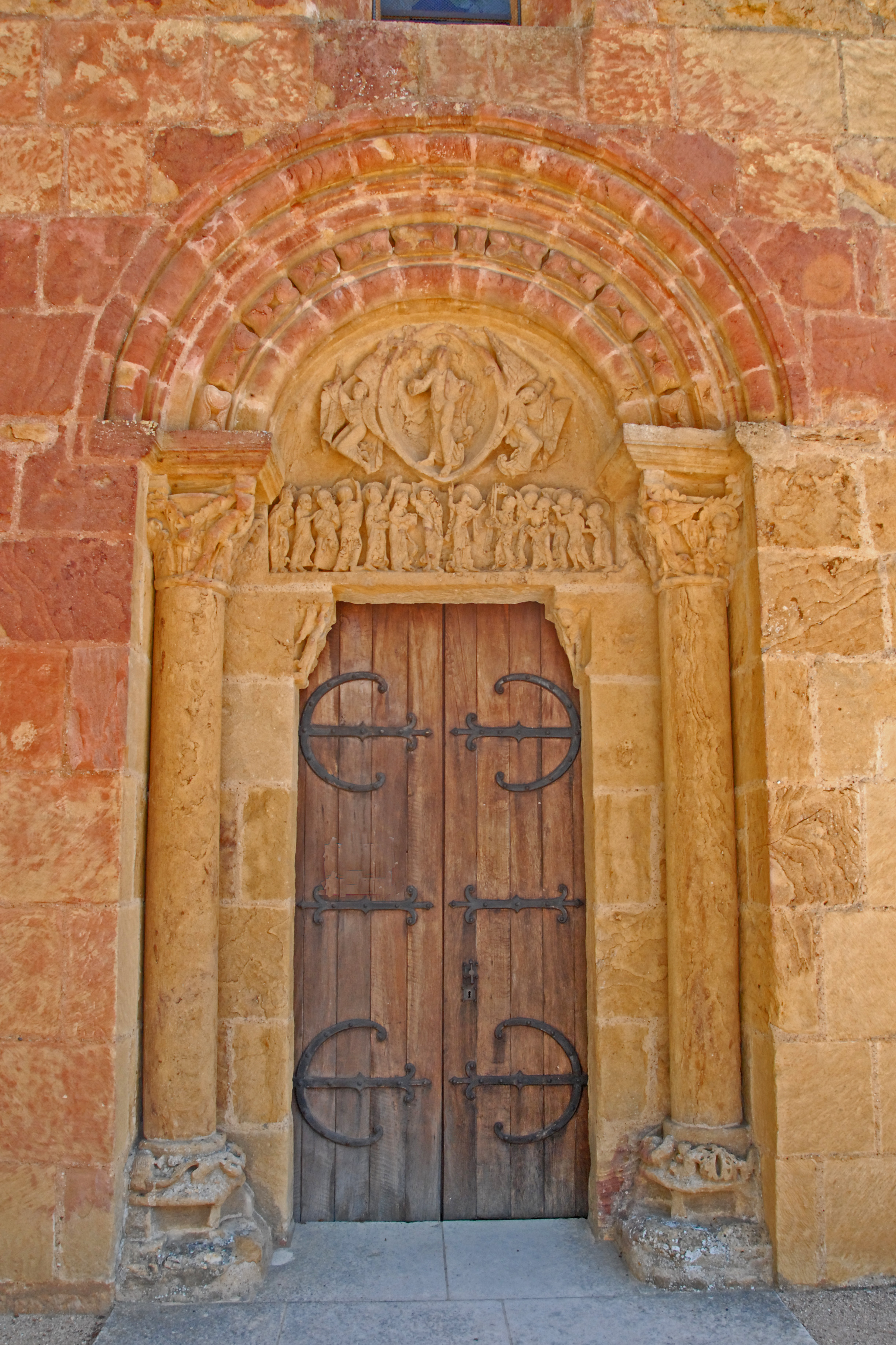 Sts-Pierre-et-Paul de Montceaux-l'Étoile, Hauptportal